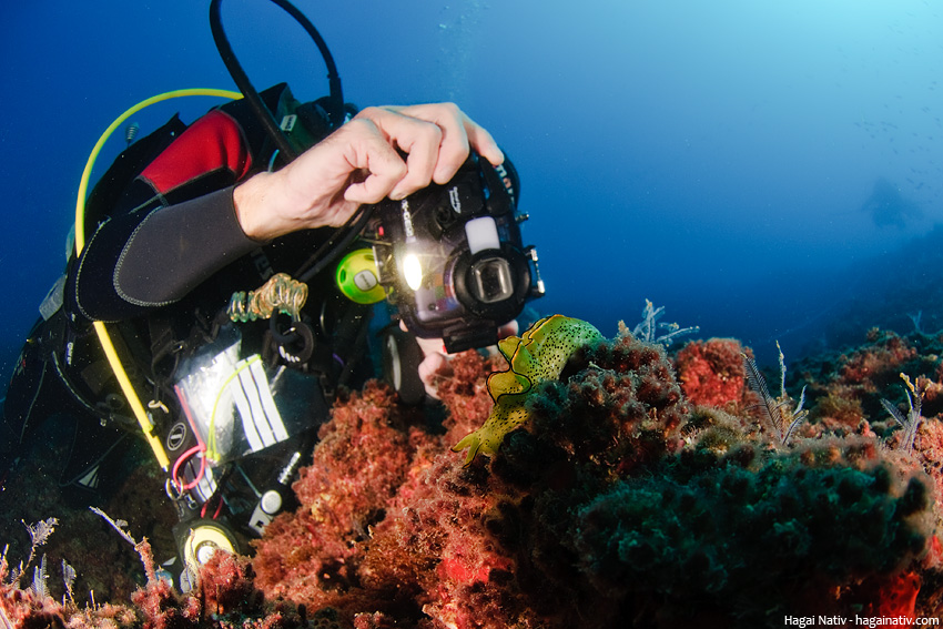 צילום של צלם תת מימי בצילום